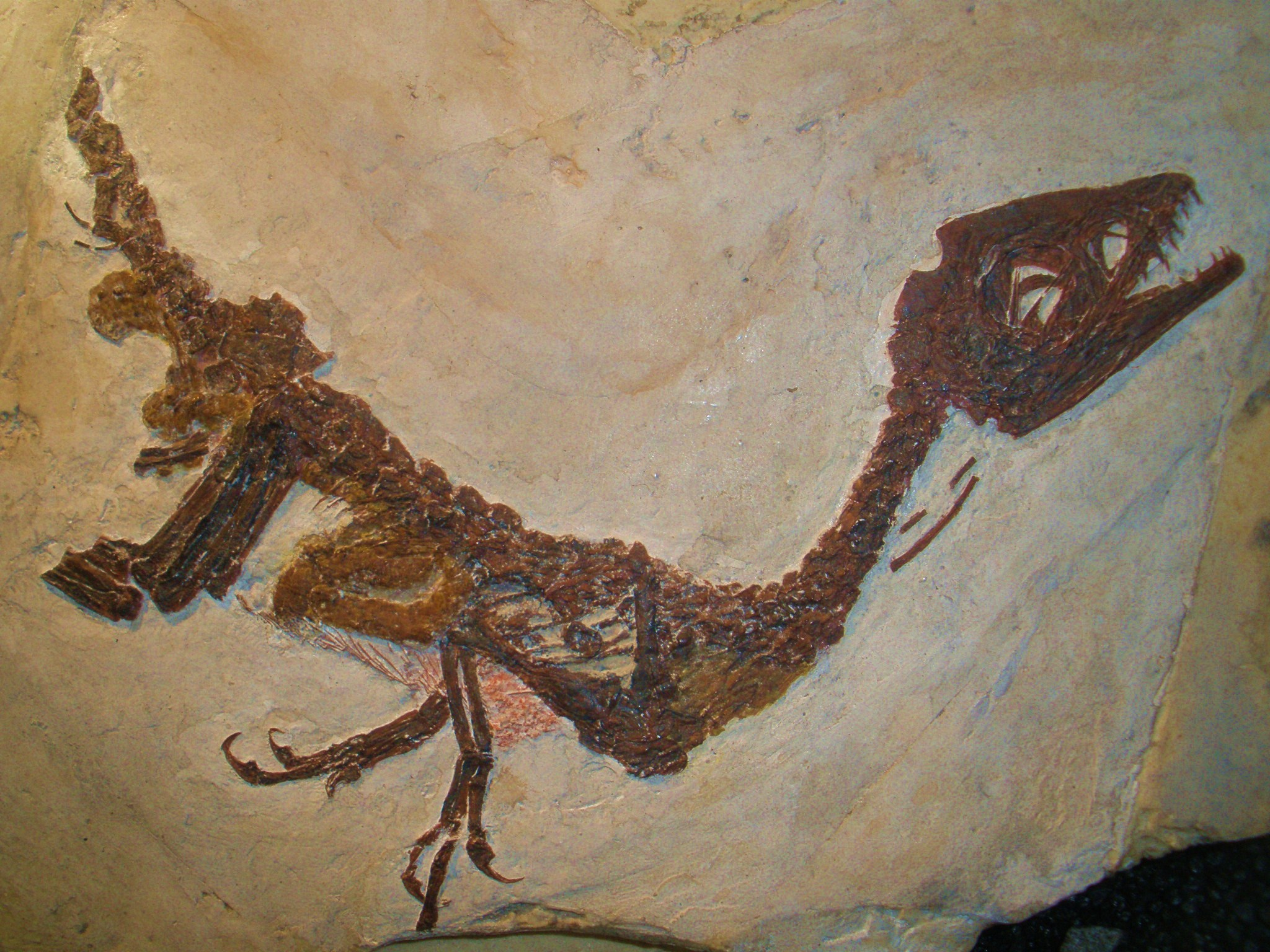 Fossil of Scipionyx, an extinct theropod- Took the photo at Fossil Show, Munich